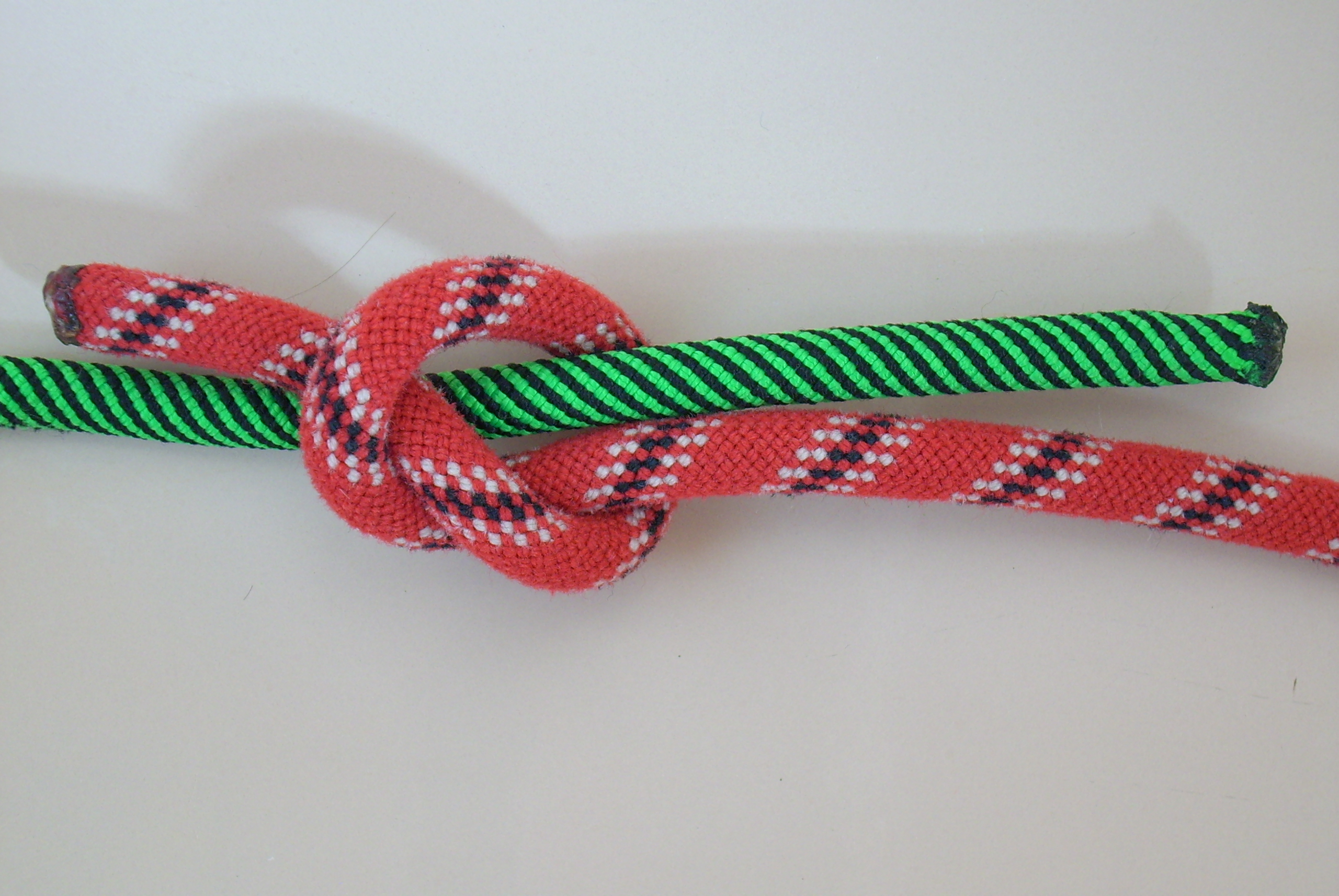 Spierenstich, Knüpfanleitung 1/3